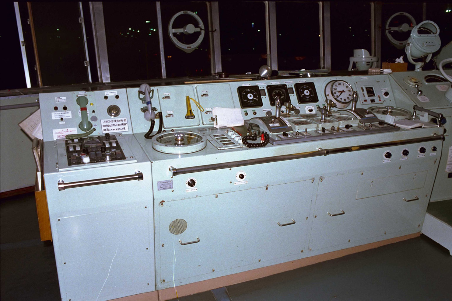 十和田丸（2代）操舵室 左側にスタビライザー制御盤増設後のプロペラ制御盤